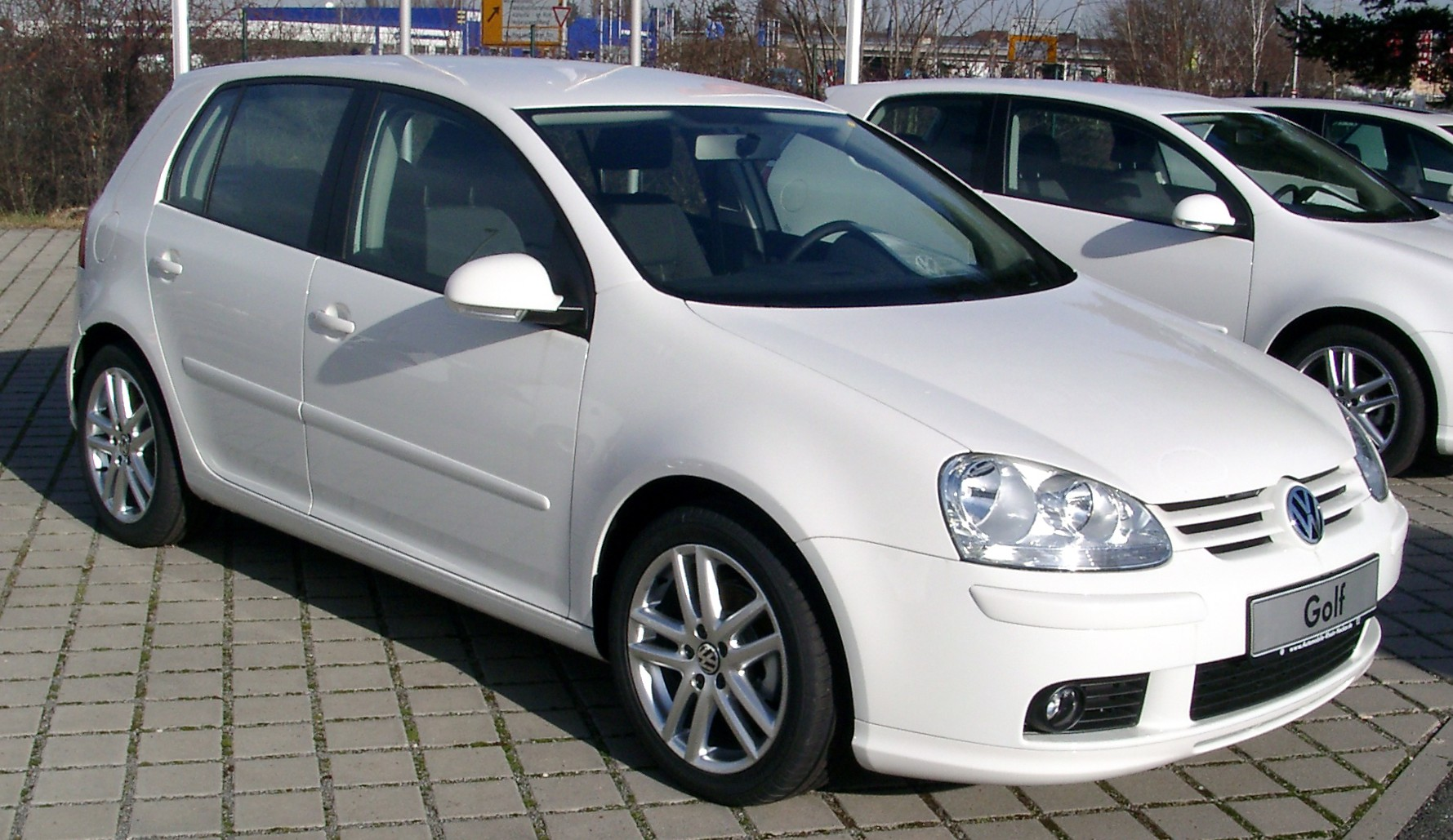 VW Golf V